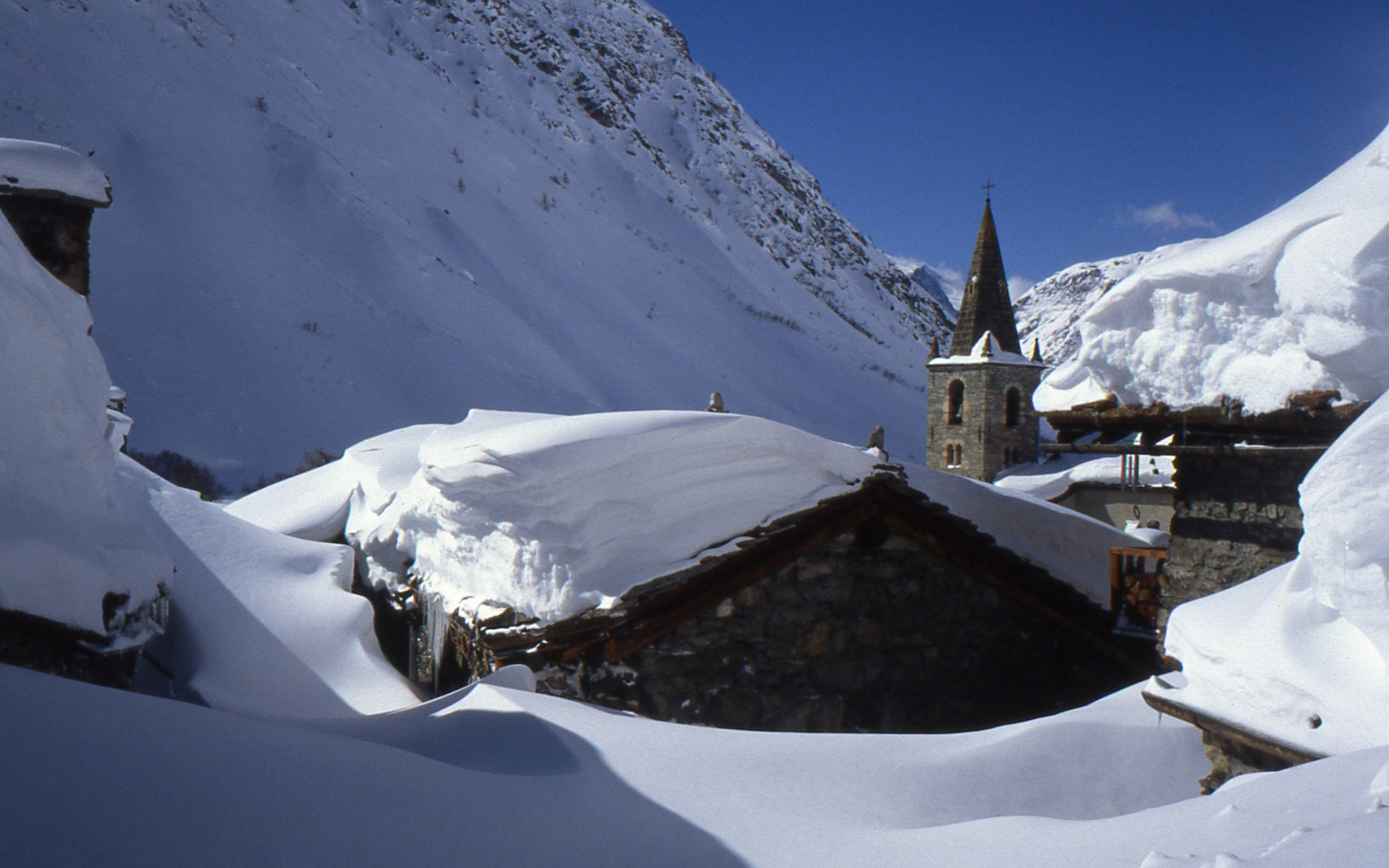 Bonneval-sur-Arc